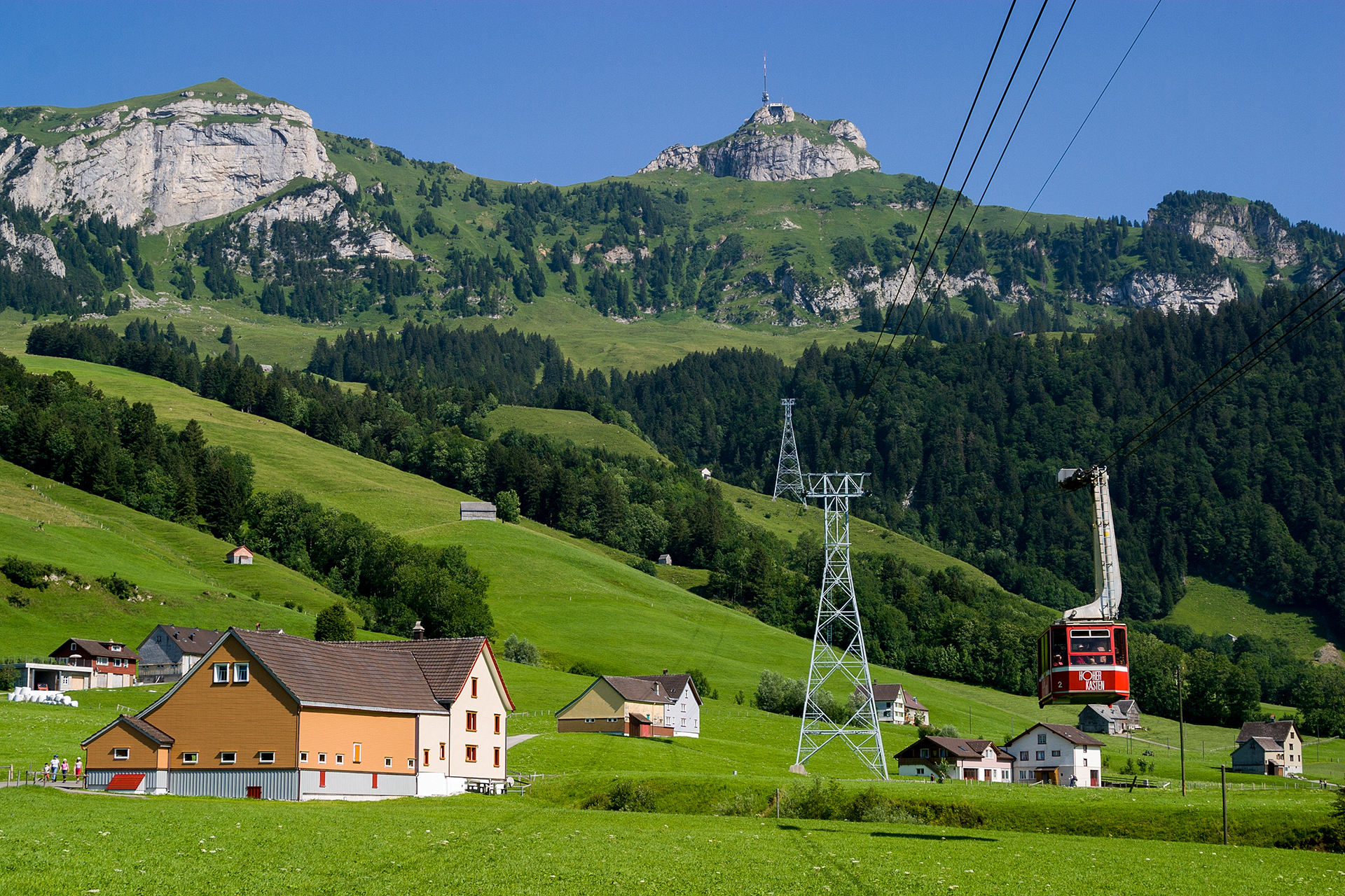 Brülisau mit Blick zum Hoher Kasten